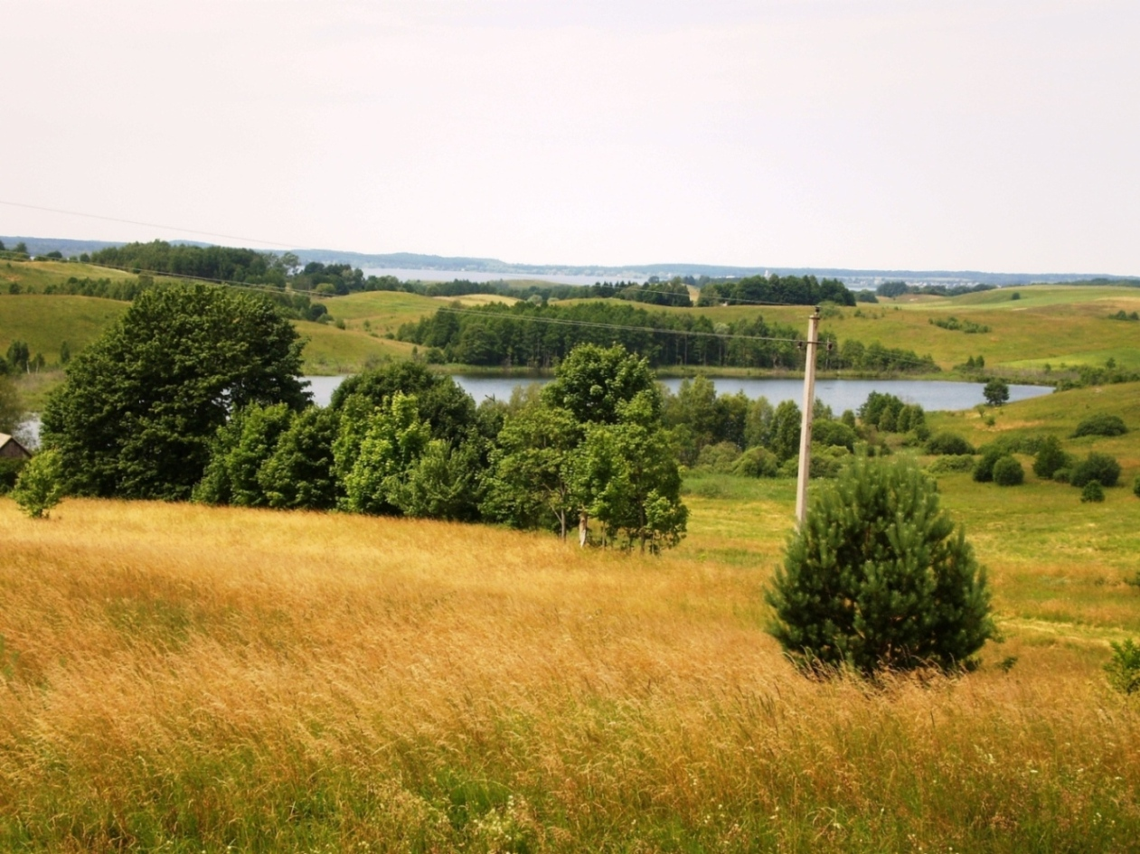 Piliakalnių (Grabausko) ežeras, Vištyčio RP, Vilkaviškio raj.